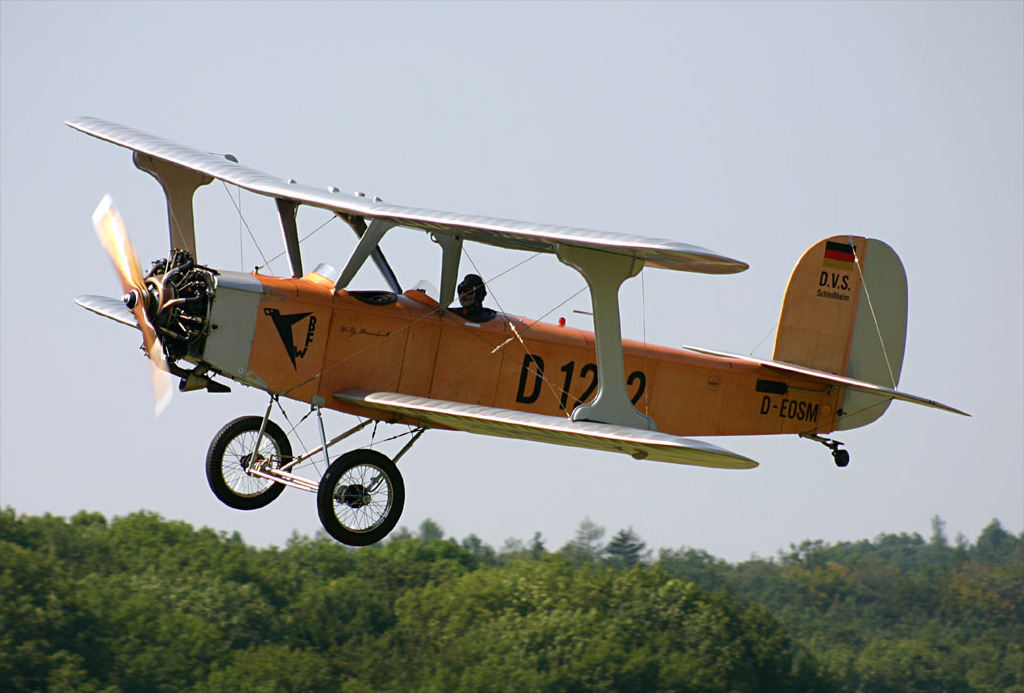 Udet U 12 "Flamingo" D-EOSM